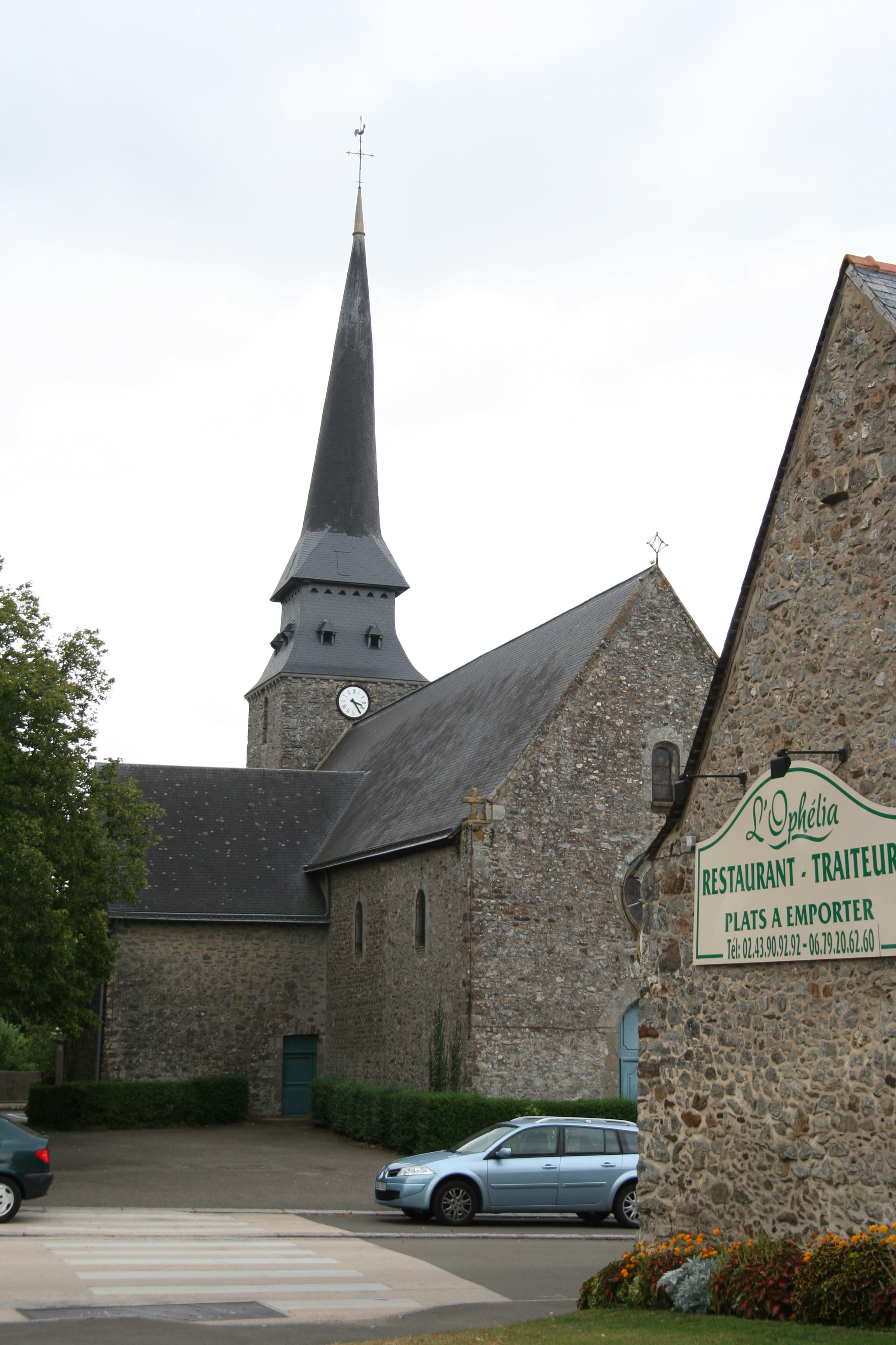 L'église Saint-Blaise de Bonchamp-lès-Laval. .